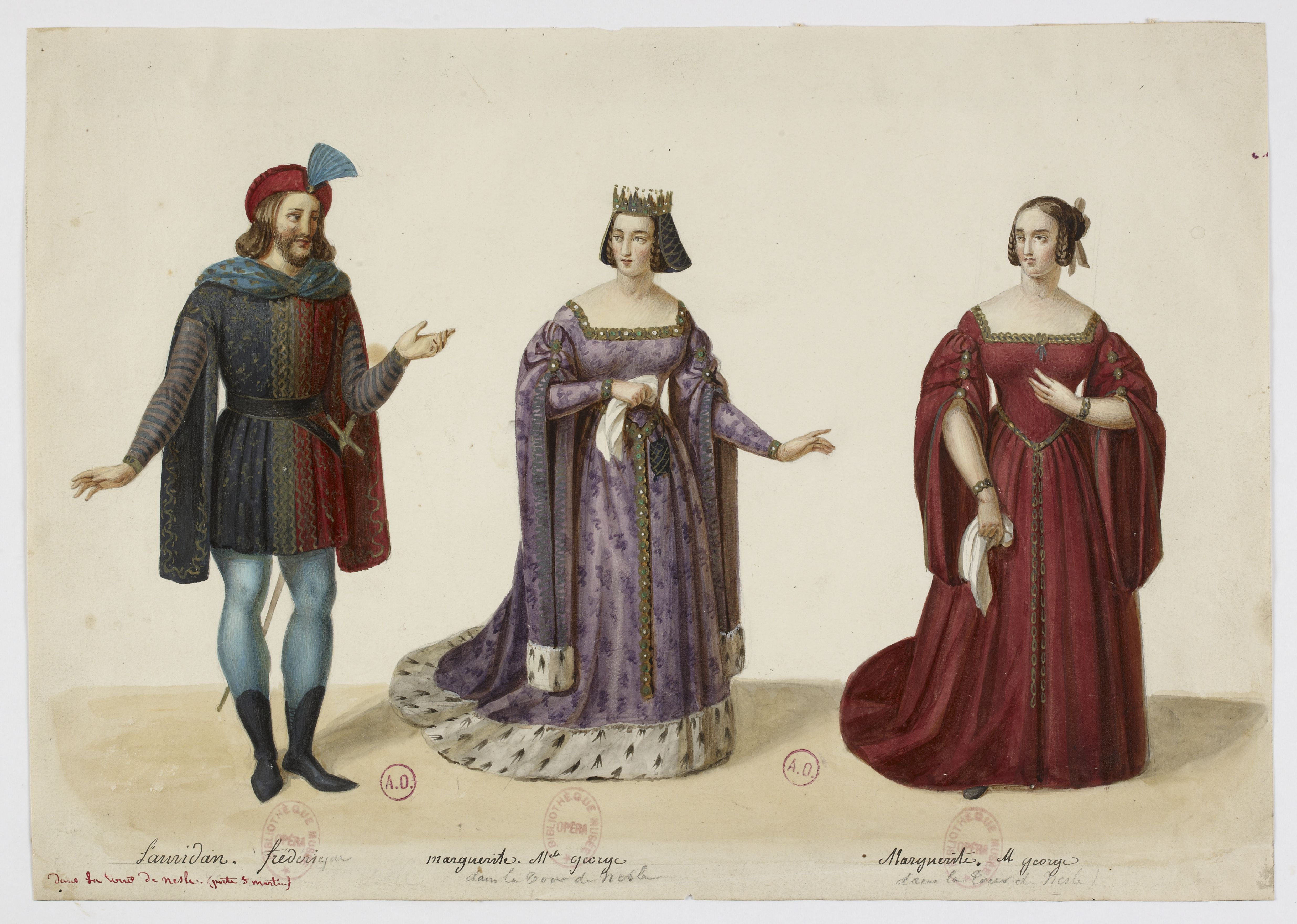 Costumes de Frédéric Lemaître dans le rôle de Buridan et Mlle George dans le rôle de Marguerite de Bourgogne (2 costumes) pour la reprise de la pièce de théâtre "La Tour de Nesle" du 15 septembre 1832. Le rôle de Buridan avait été créé par Bocage. Aquarelle et rehauts de gouache par Eugène du Faget (Bibliothèque nationale de France, D216 O-2)